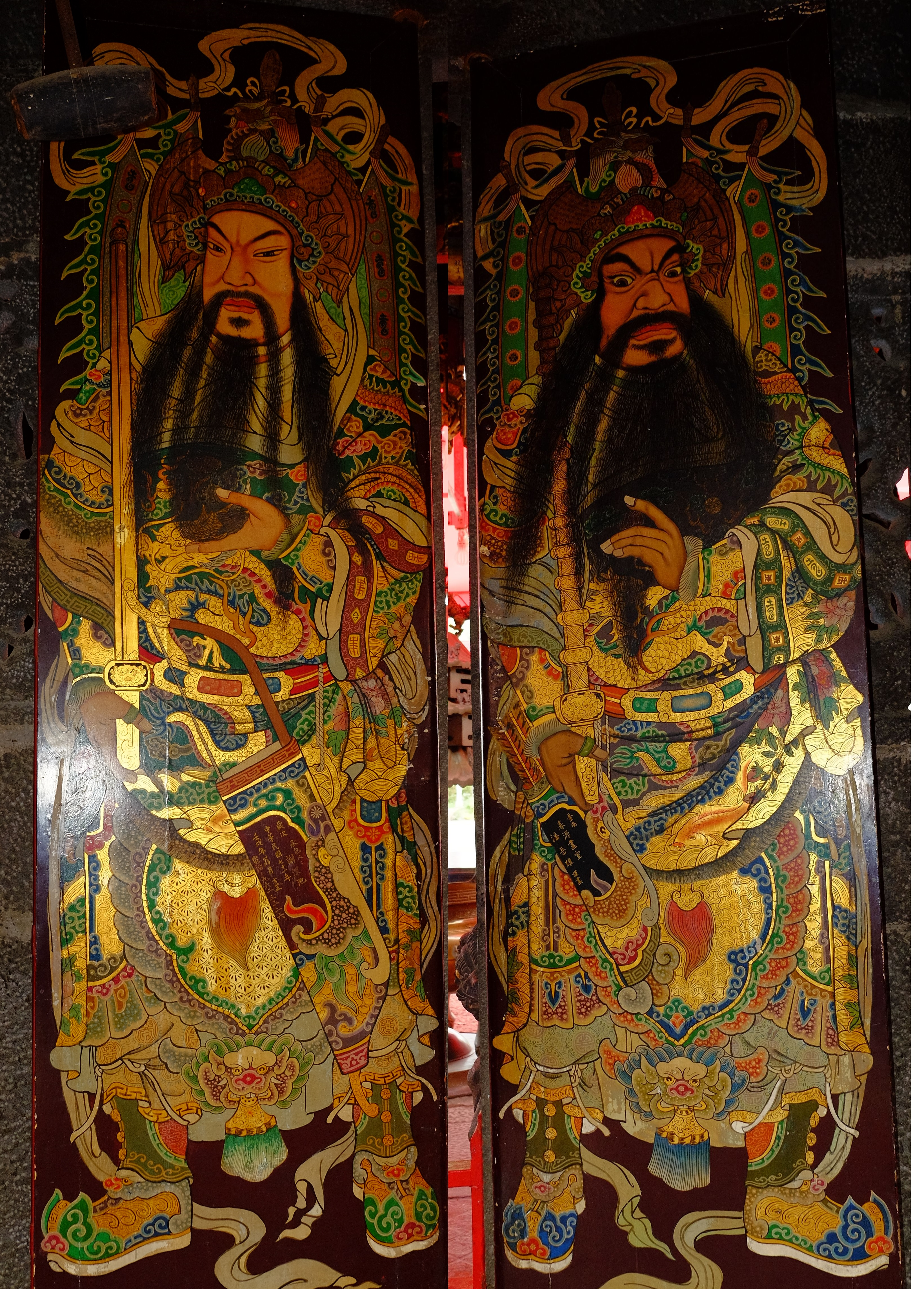 先嗇宮潘岳雄所繪門神